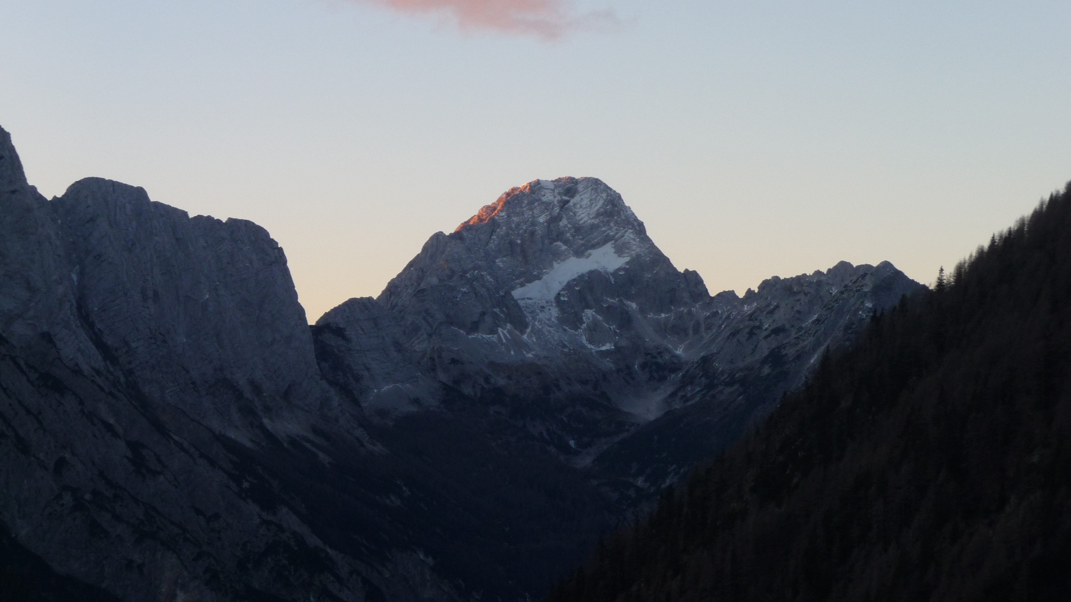 Bavški Grintavec izpod Vršiča